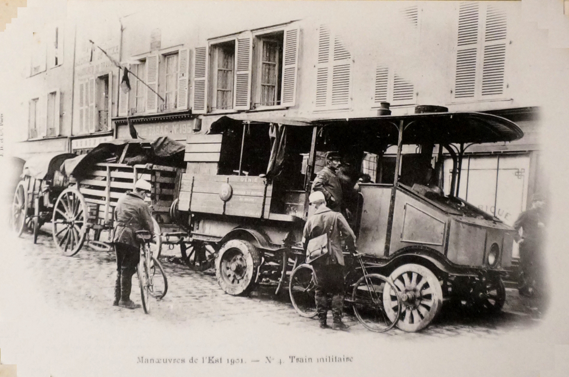 lors des Grandes maoeuvrves de l'est de 1901. BM Reims cote CPA t4. Publication de 1901 en cartes postales.